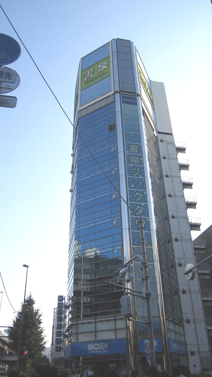 「書泉ブックタワー」を撮影したもの。2011年10月10日15時頃。